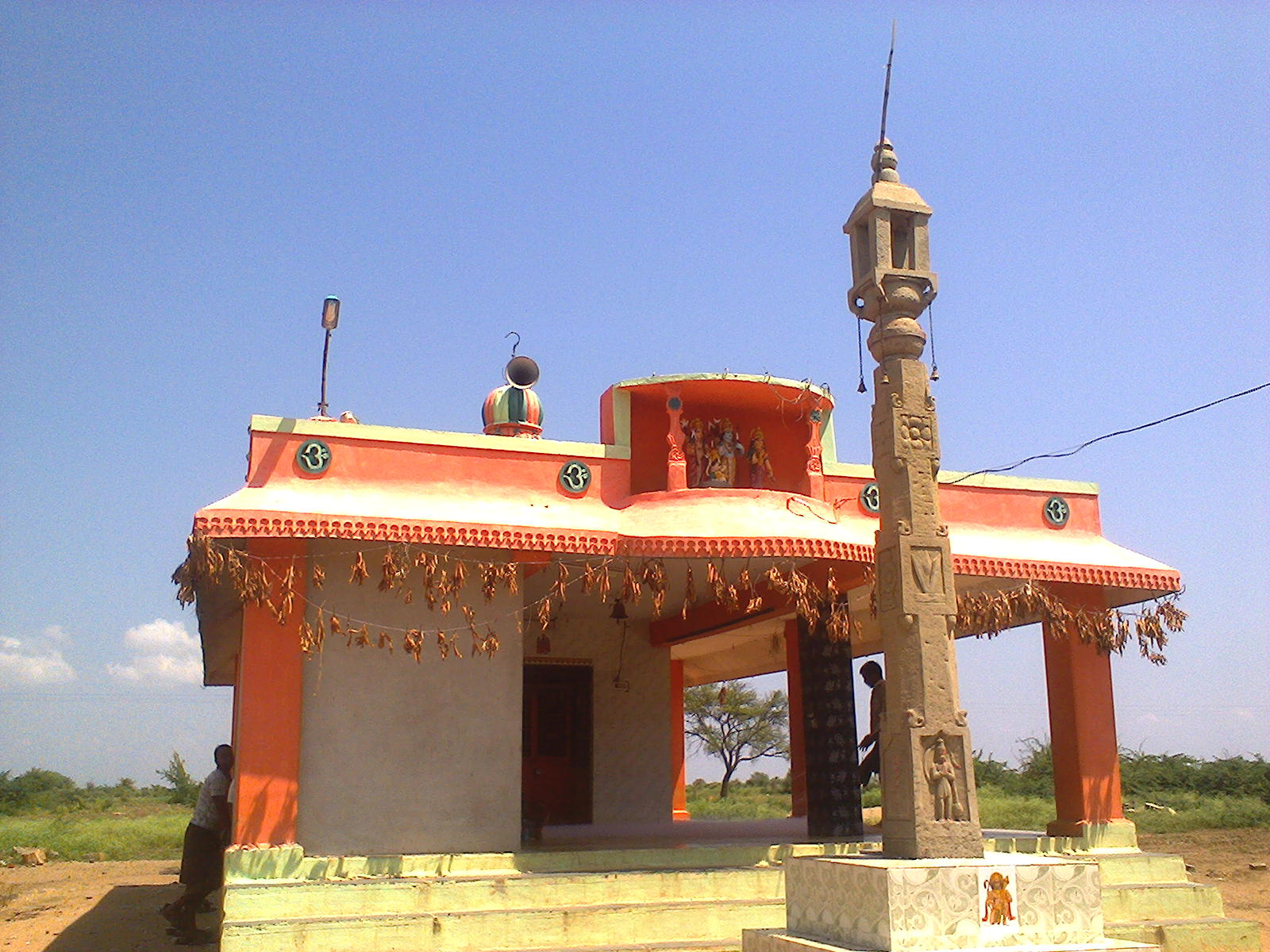 శ్రీఆంజనేయస్వామి దేవాలయం,భైరంపల్లి